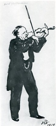 Hugo Boettinger - houslista Karel Hoffmann